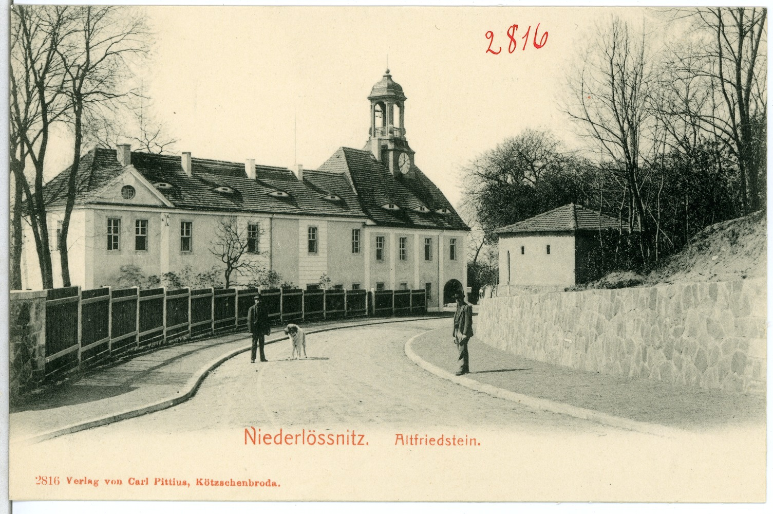 Niederlößnitz; Altfriedstein This postcard is from publisher Brück & Sohn in Meißen ( postcard has a unique number 02816 and is available in a higher resolution at the publisher. This images was uploaded in a cooperation project between Wikipedians and the publisher.